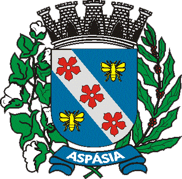 Brasão_do_Municipio_de_Aspásia